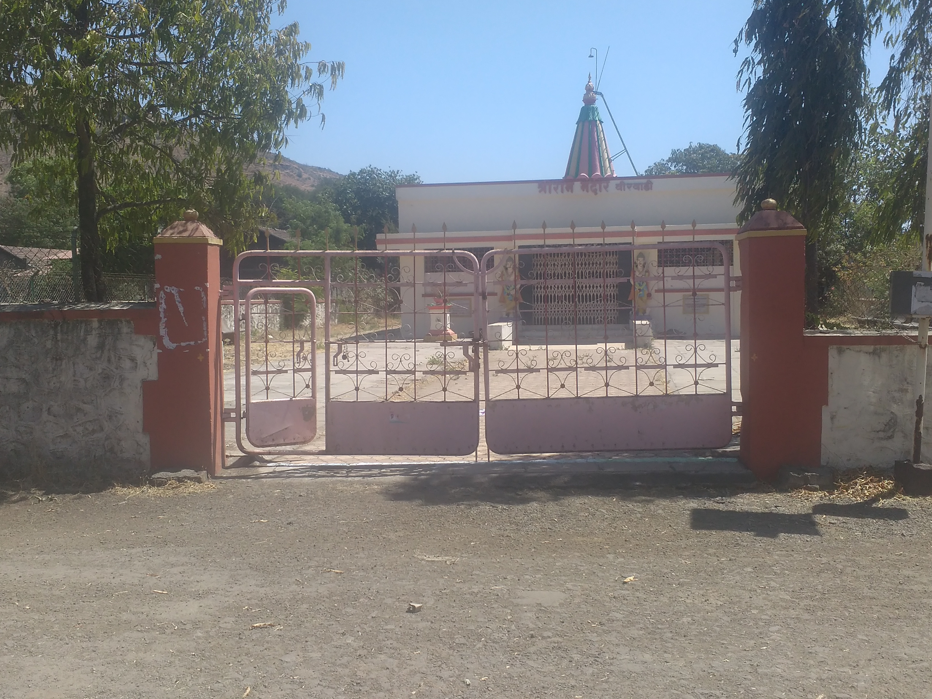 विरवाडी श्रीराम मंदीर